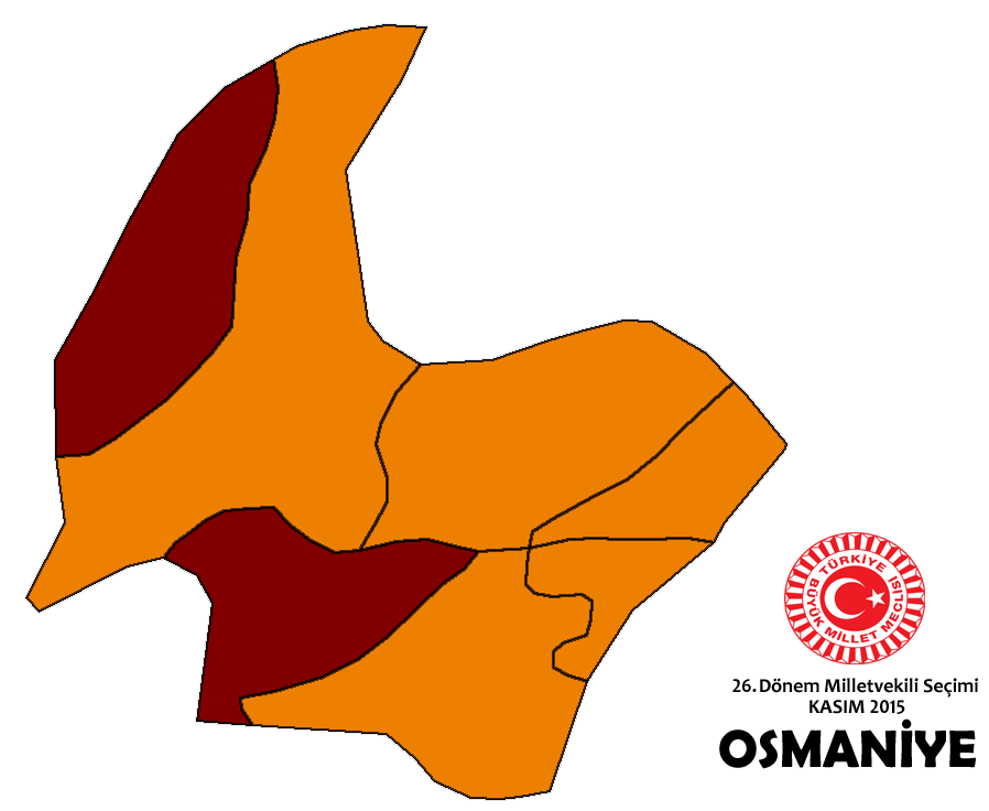 Kasım 2015 Seçimleri